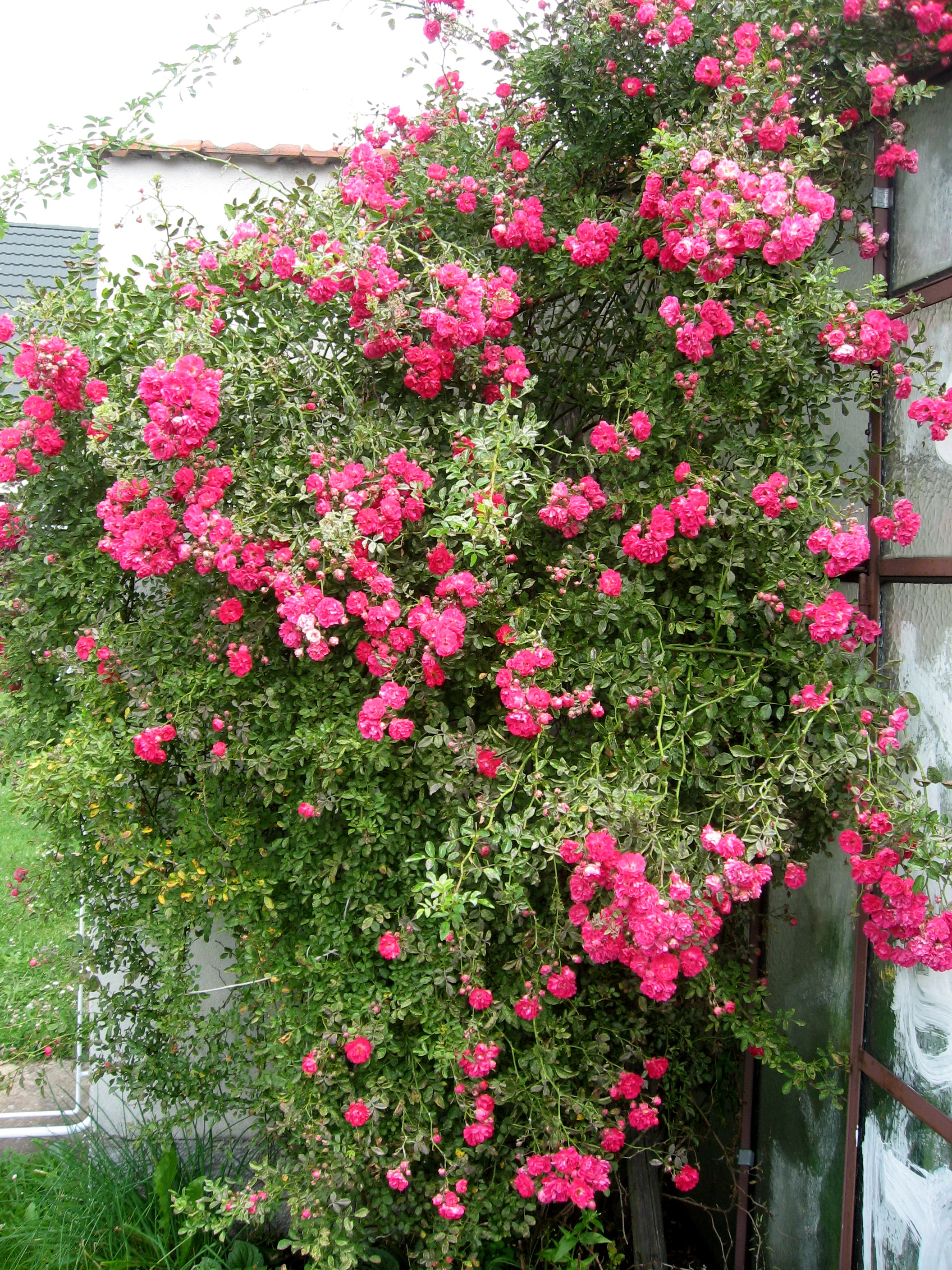 Popínavá růže